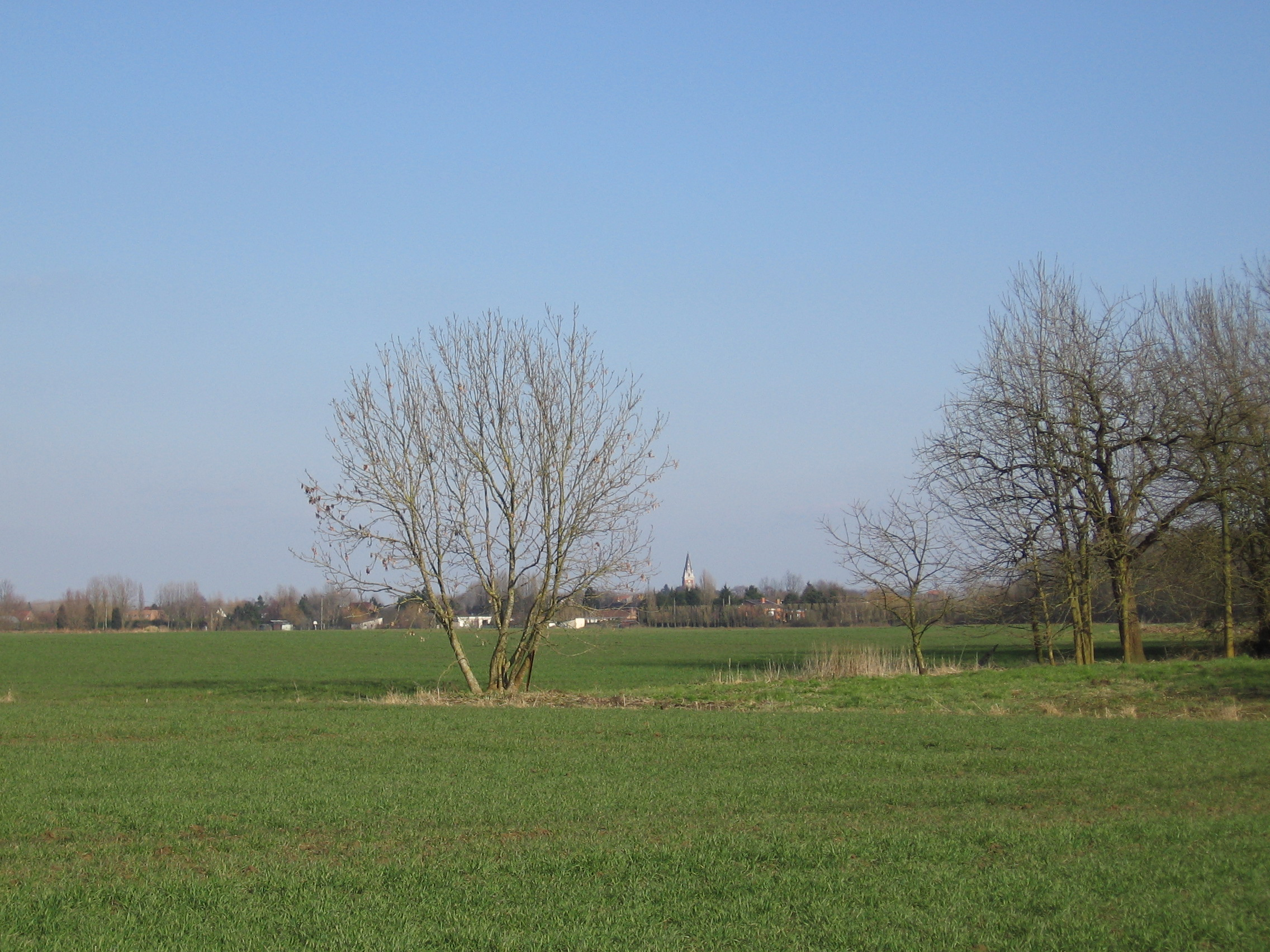 Aubers, vue de Fauquissart (commune de Laventie